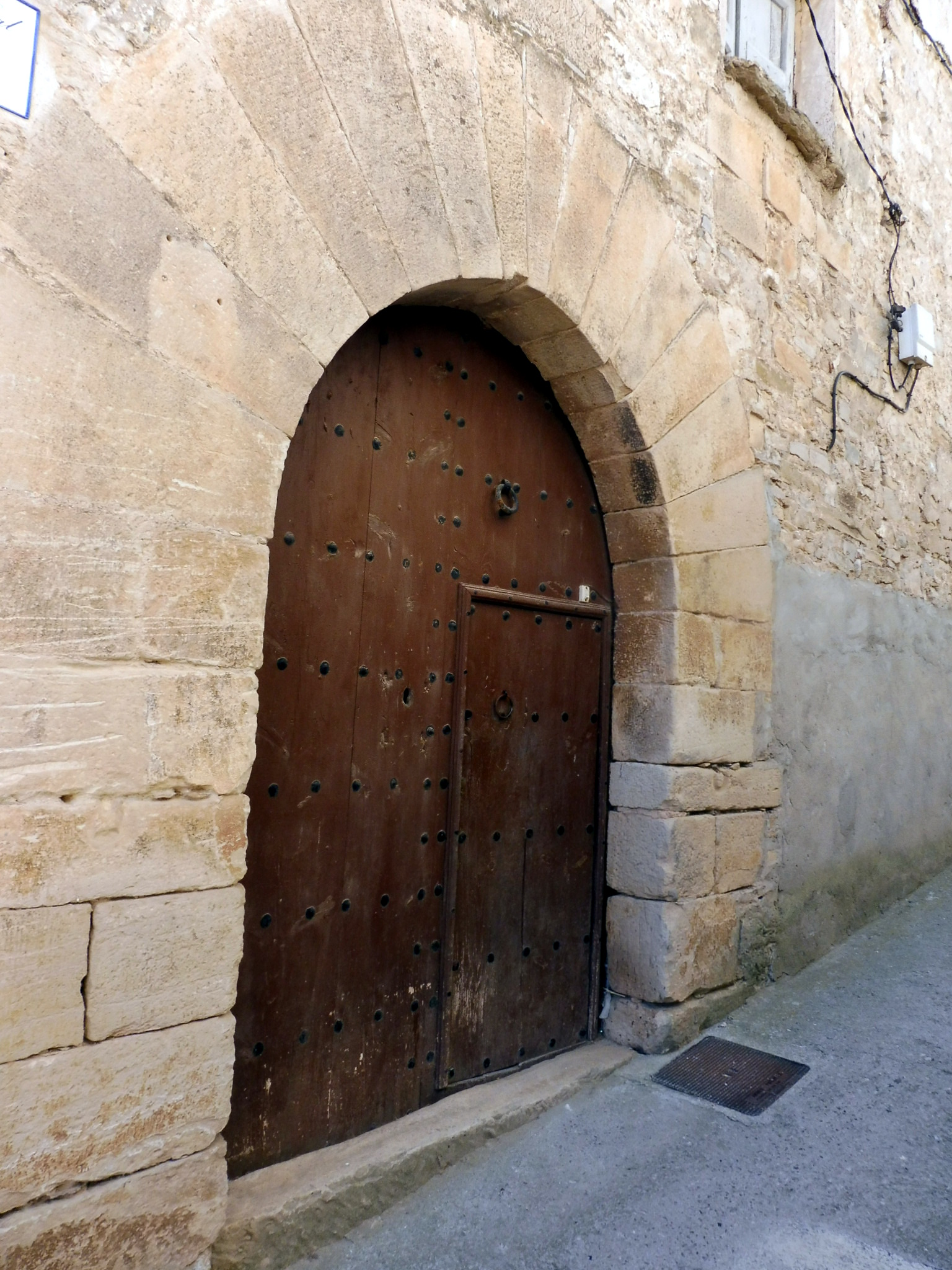 Cal Xacó de Vilagrasseta (Montoliu de Segarra): portal